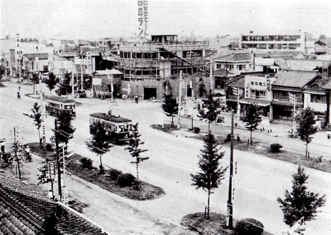 1958年の駅前大通。街路樹が立ち並び、複線の線路を路面電車の豊橋電気軌道本線（豊橋鉄道東田本線）が走っている。愛知県豊橋市。